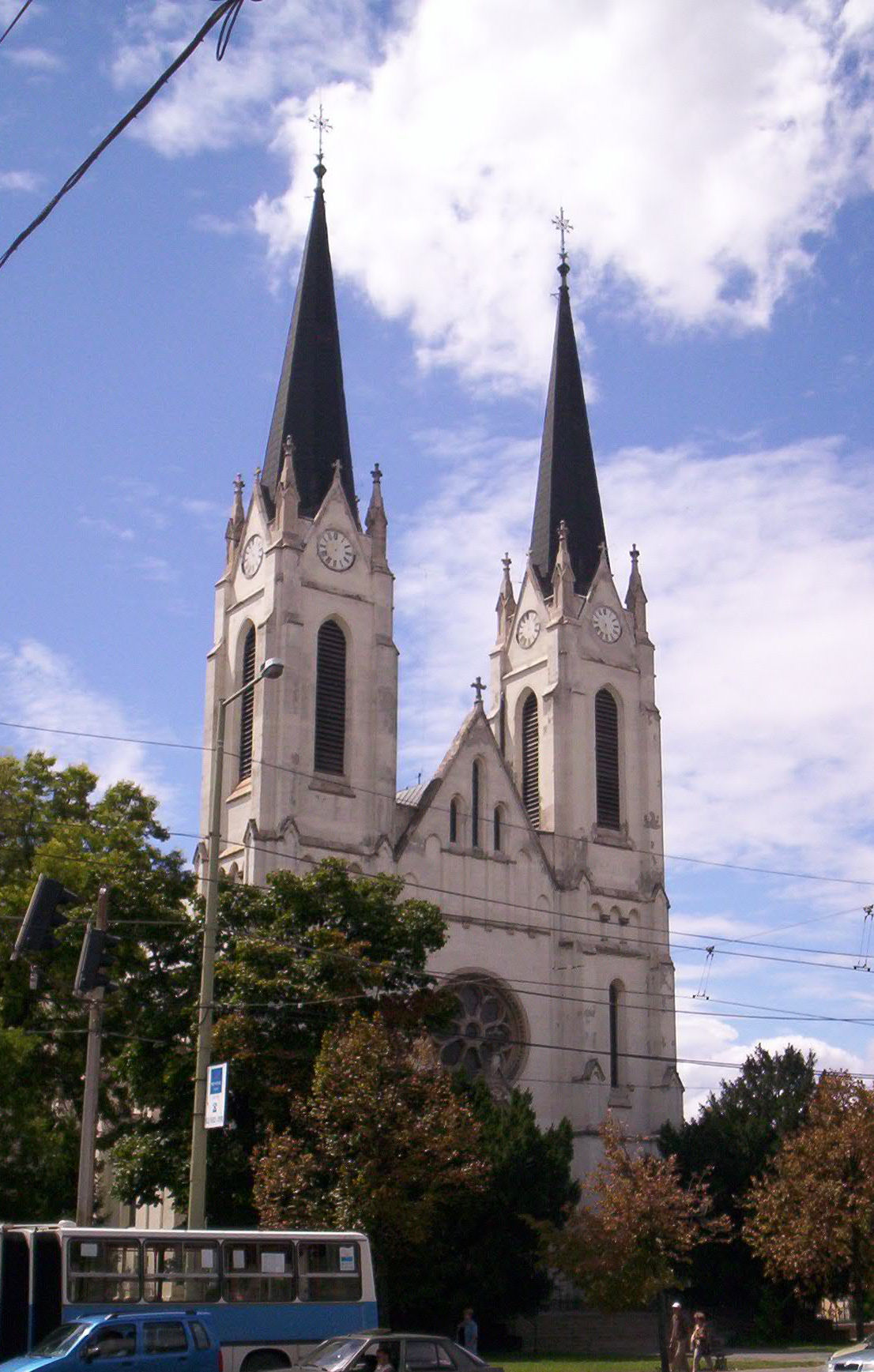 A Szent Rókus tiszteletére emelt templom Szegeden. A neogótikus templom 1909-ben épült, Aigner Sándor és Rainer Károly tervei alapján. – photo taken by uploader User:Csanády in 2006.